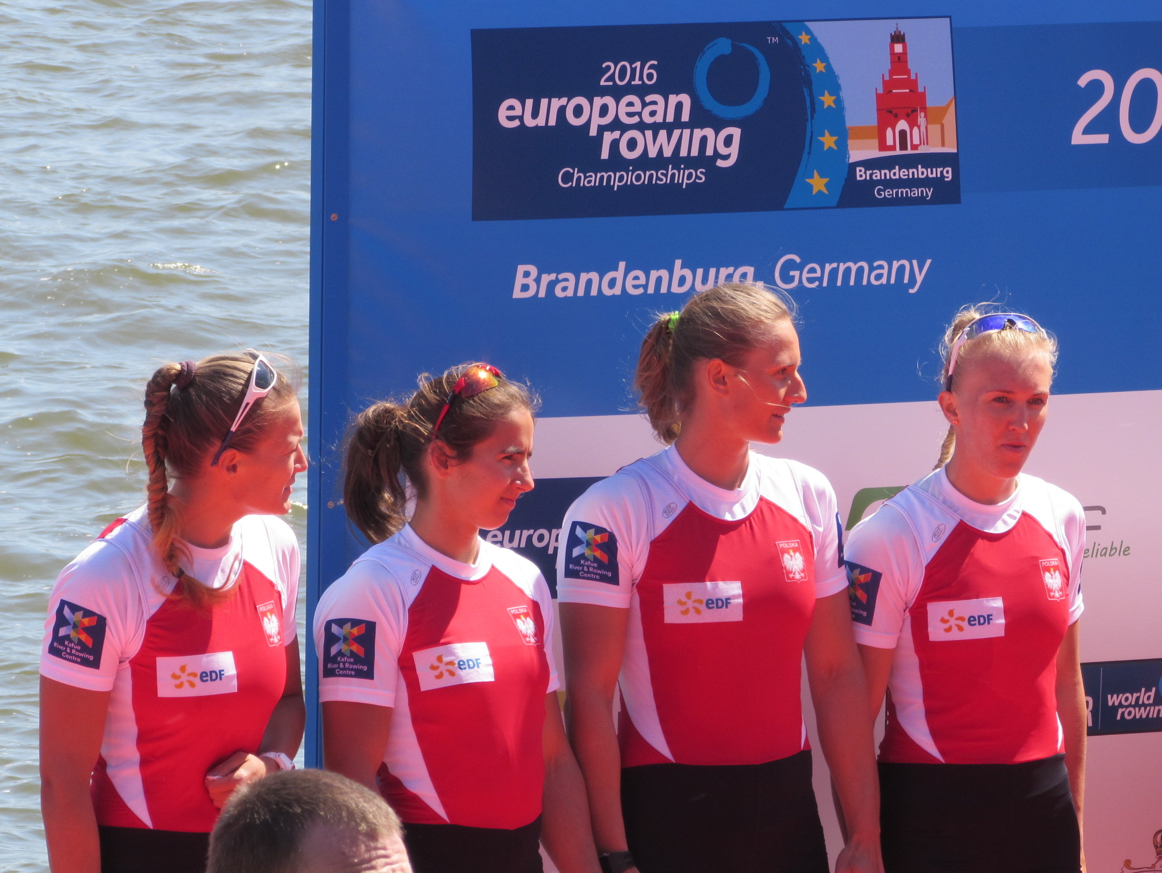 Monika Ciaciuch, Maria Springwald, Joanna Leszczyńska, Agnieszka Kobus, Ruder-EM 2016